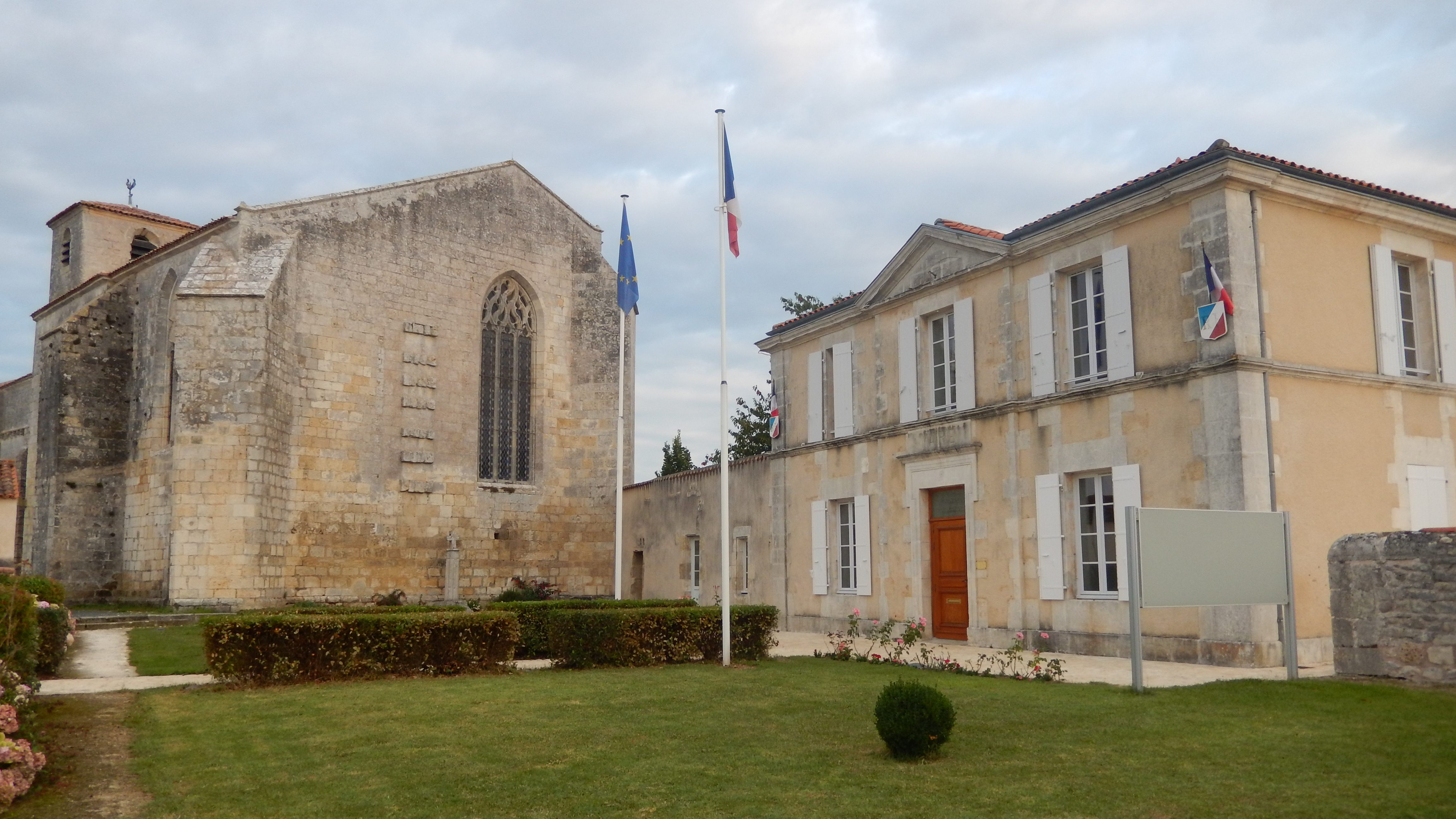 L'église et la mairie de Saint-Hippolyte, une commune française de Charente-Maritime.